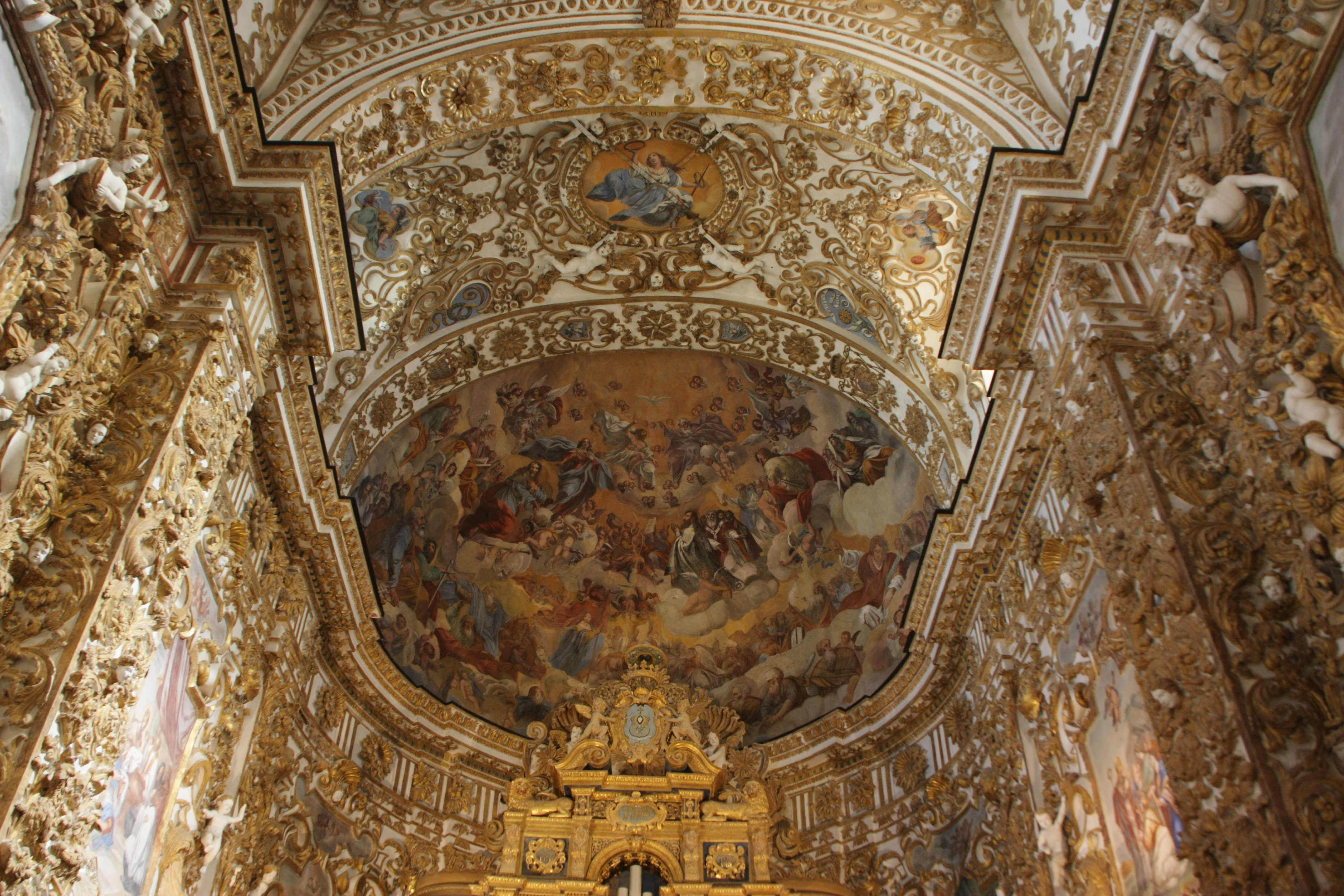 Decorazioni cattedrale Agrigento